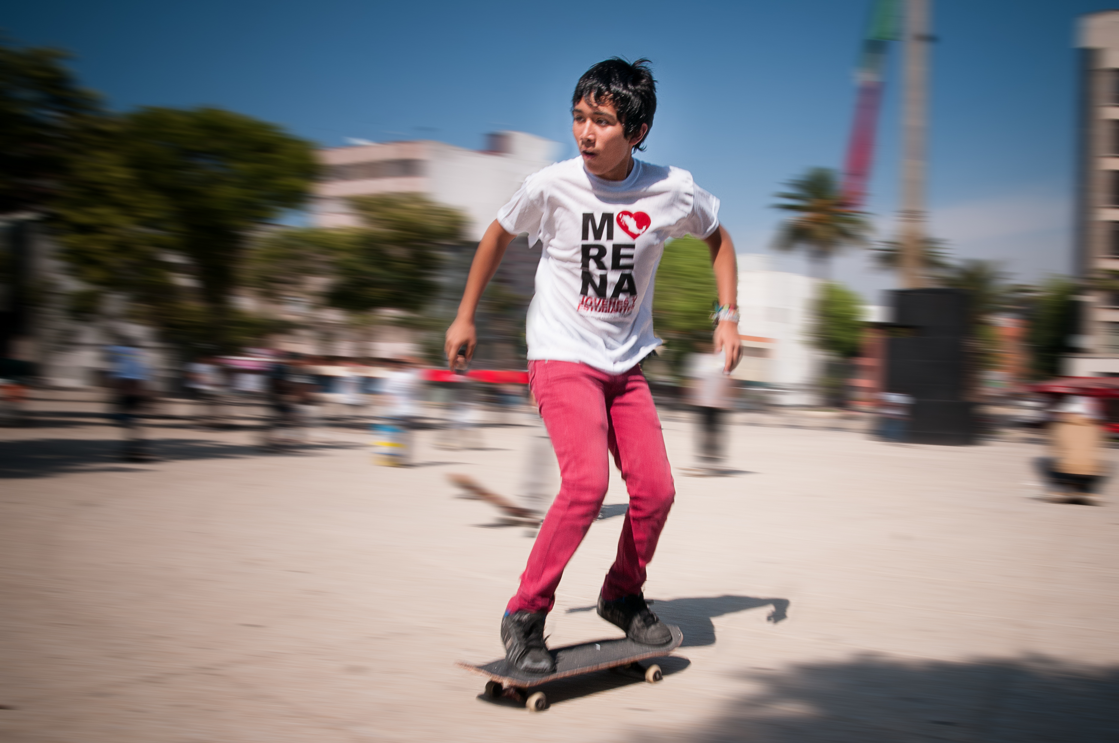 El día de hoy MORENAJE realizó una patinada proAMLO en el Monumento a la Revolución. Se reunieron 50 chavos con stickers de #YoAmoPatinar y #YoConAMLO para demostrar su apoyo al candidato de las izquierdas. Paco Manzanares, una de las figuras más prominentes del Skate en el DF, dijo que apoyan a AMLO porque en el DF se han desarrollado espacios específicos para poder practicar ese deporte y sería bueno ver una política similar para los chavos de Tijuana, Tamaulipas, Ciudad Juárez y tantas otras ciudades del país. Dijo que otros partidos le habían ofrecido hasta 80mil pesos para organizar un evento similar, "pero con gente bien, que no protestara"; él declinó esas ofertas pues declara que "los chavos que están aquí son gente bien, hacen deporte y les interesa esta expresión cultural".